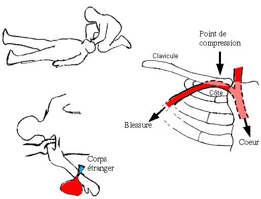 arrêt d'une hémorragie au membre supérieur par point de compression sous-clavier